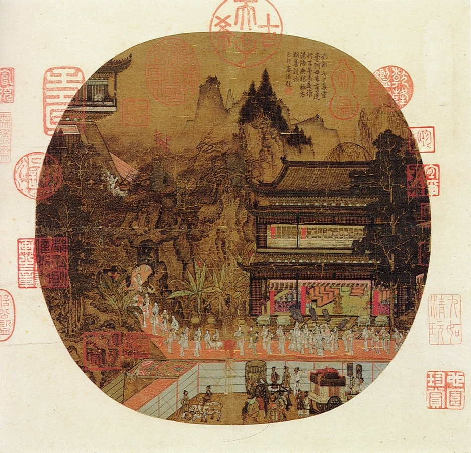 Le palais Han. Anonyme fin du douzième siècle, (Attribution erronée à Zhao Boju) (1120-1182). Feuille d'album, encre et couleurs sur soie. L. 24,5cm. Collections du Musée du Palais. Taipei (Formose).